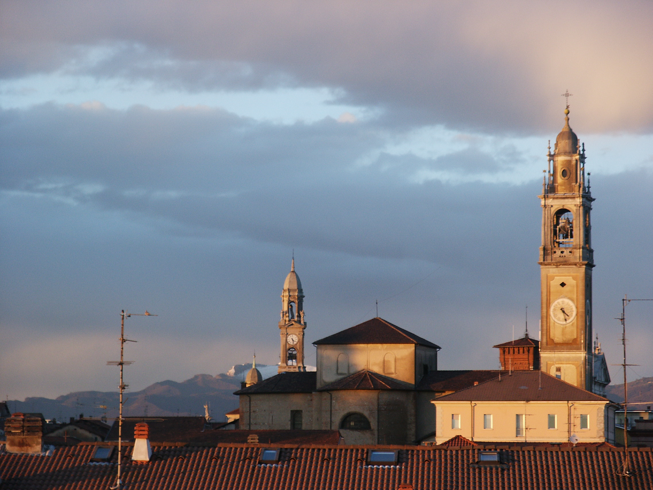 Lomazzo, campanili, vista al tramonto